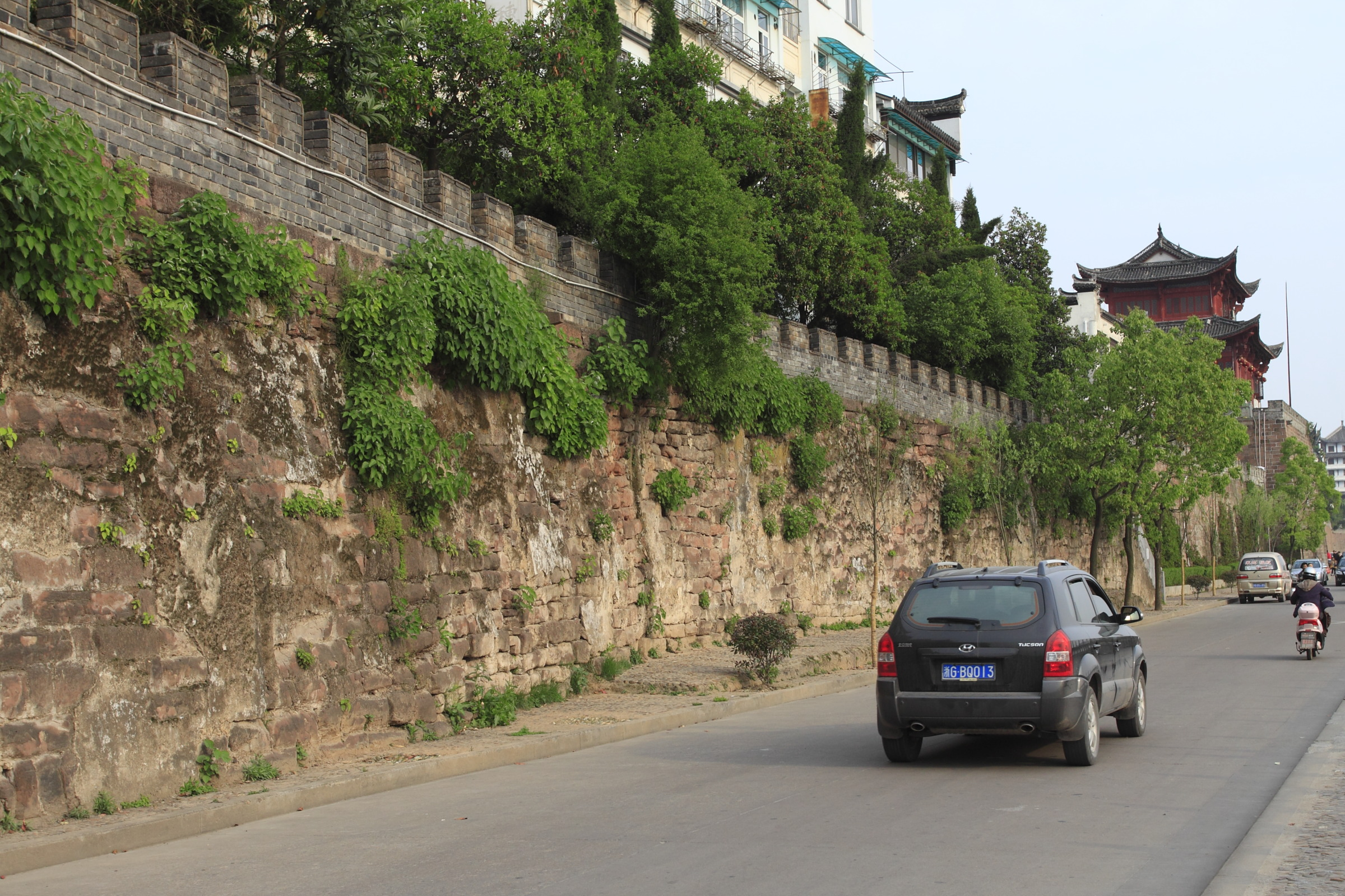 浙江兰溪古城墙，兰溪市文物保护单位